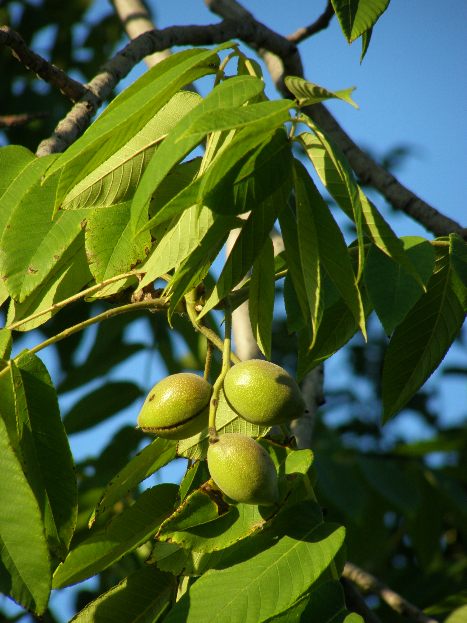 Зрелые плоды и листья маньчжурского ореха